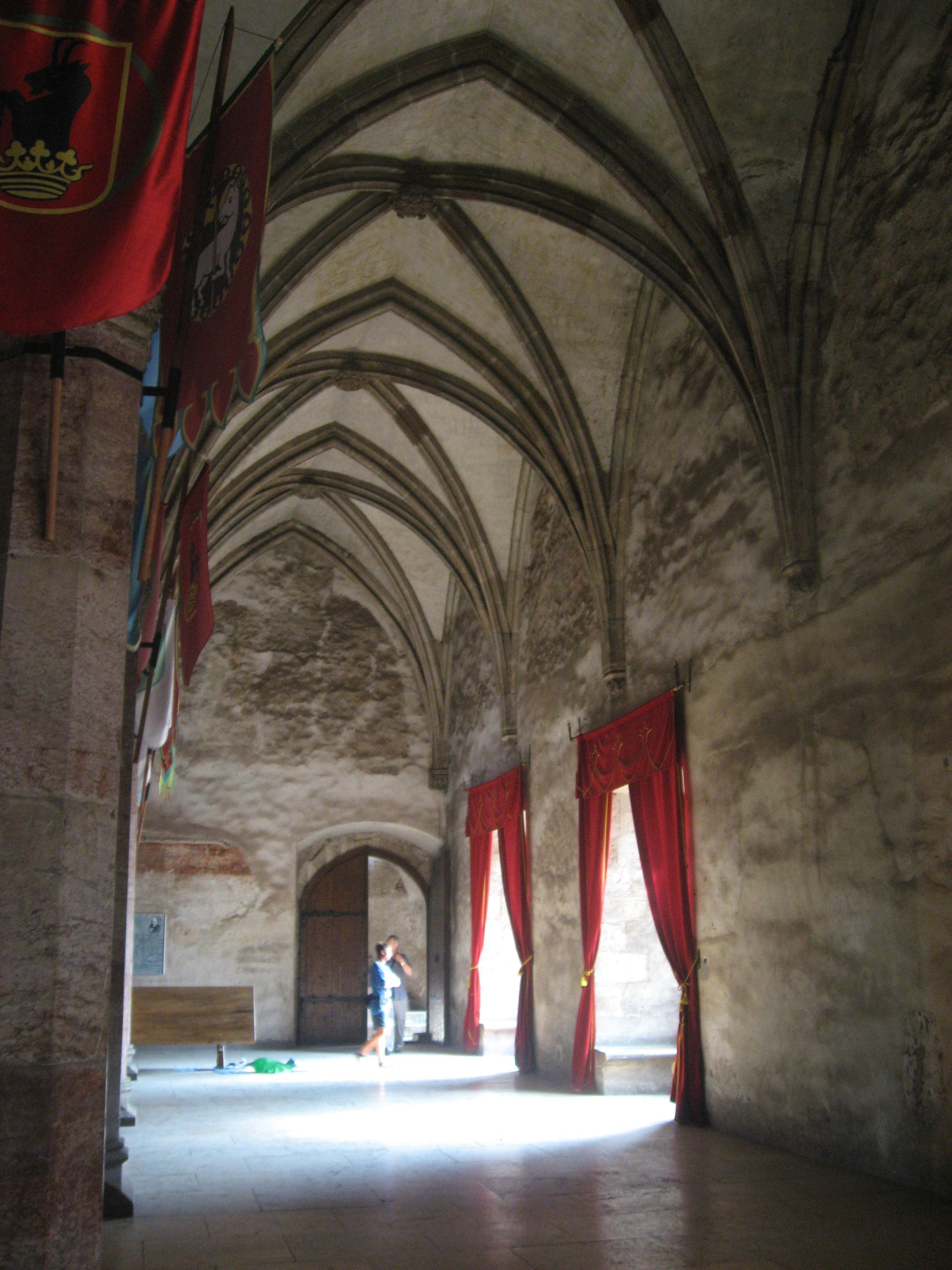 Hrad Hunedoara